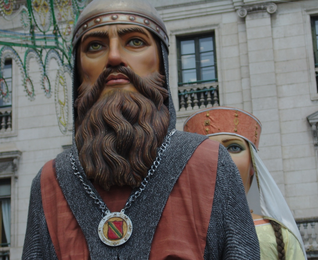 Fiestas de Burgos, los «Gigantones», Rodrigo Díaz de Vivar «El Cid».